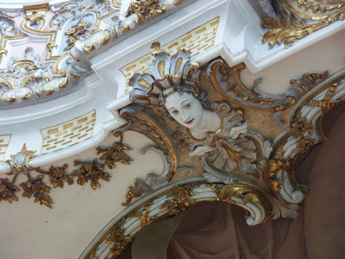 St. John the Baptist (Welfen Münster), Steingaden, Germany